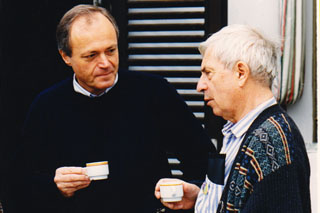 Medgyessy Péter és Bacsó Péter beszélgetnek - Szárszói Találkozó 1994